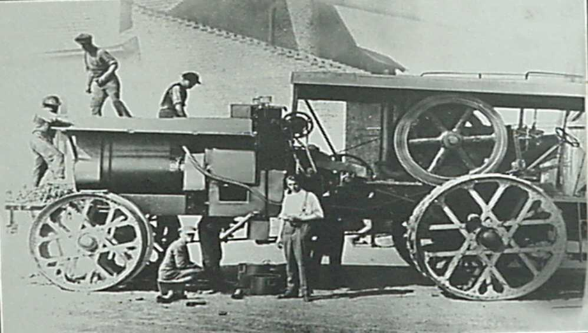 Kabay az ellenõrzött morfin gyártáshoz, az ópium fázis elkerülésével, elõbb zöld máknövénybõl "zöld" eljárássaal történő kivonás módszerét használta. Kabay önjáró "MOBIL" kivonógépe, 1927